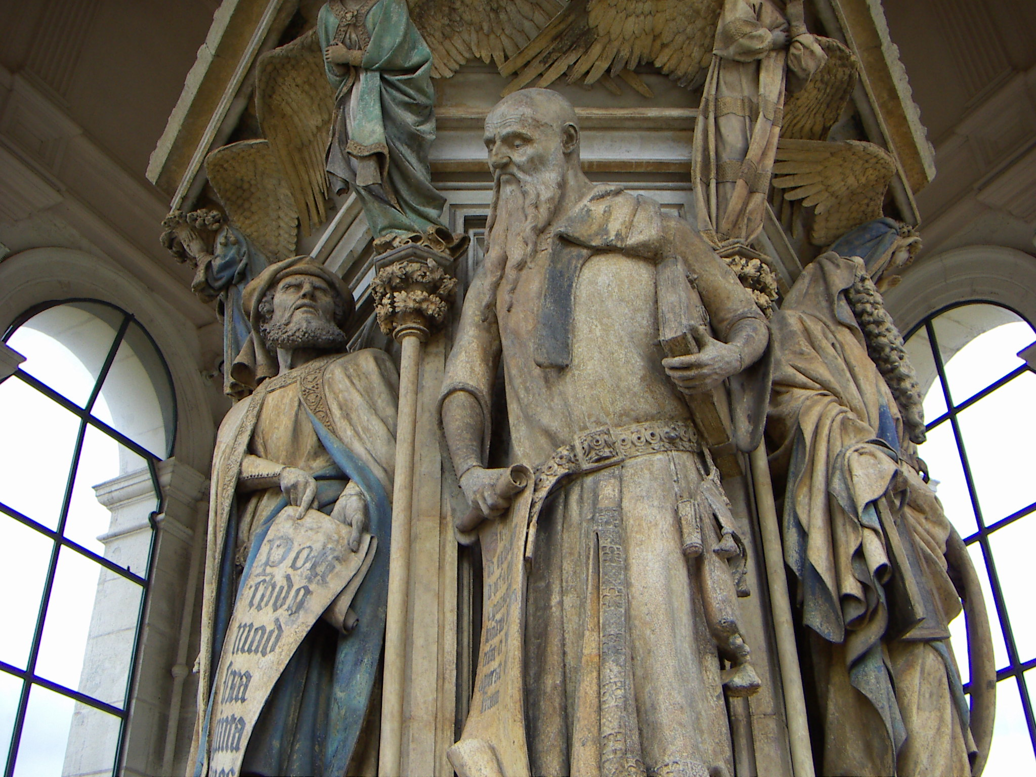 Isaïe, Puits de Moise, Dijon, Bourgogne, FRANCE.